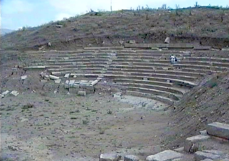 Antiochia in Pisidien, Türkei, Theater